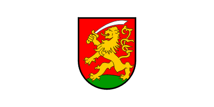 Blazono de Virovitica.